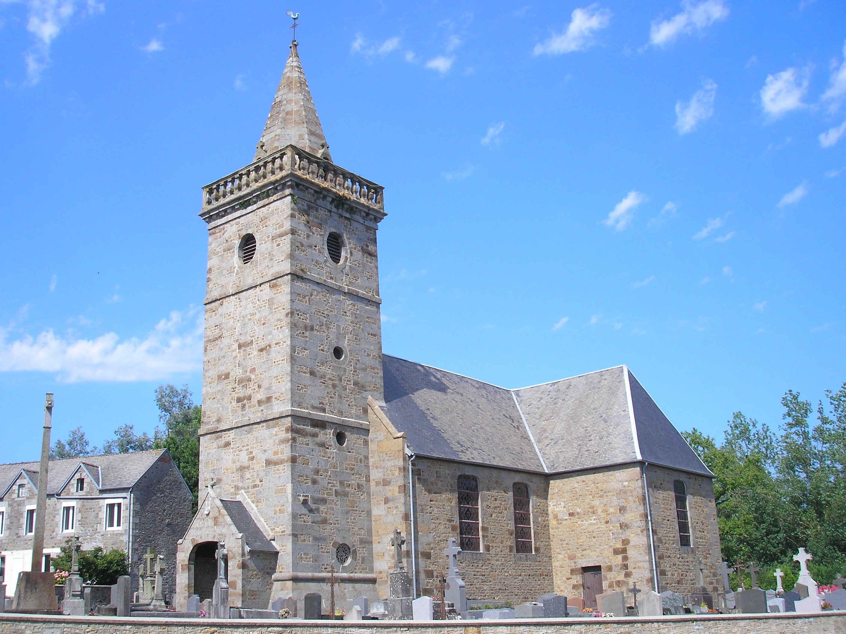 Sainte-Pience (Normandie, France). L'église Sainte-Pience.